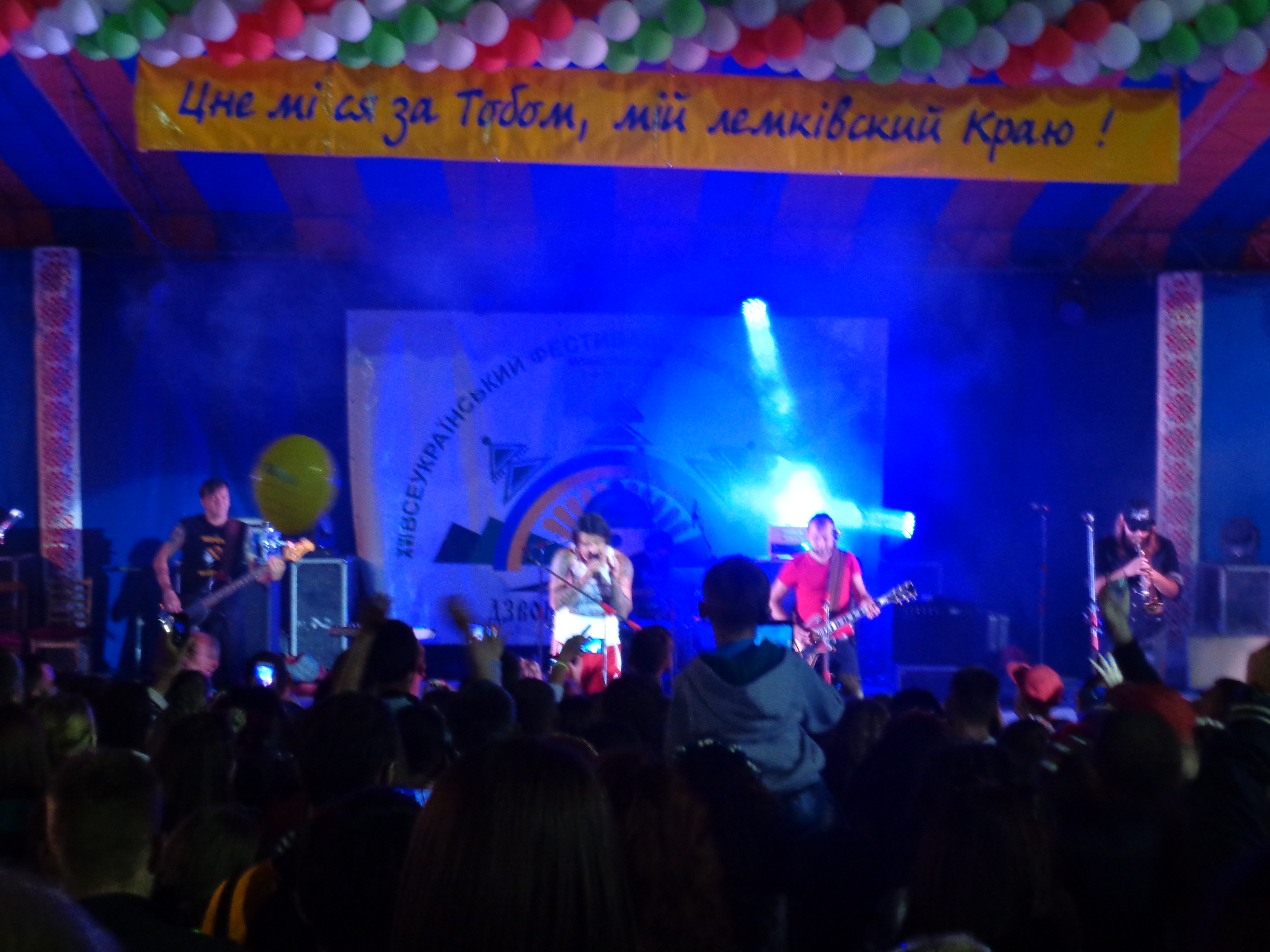 "Kozak System" на фестивалі лемківської культури "Дзвони Лемківщини".